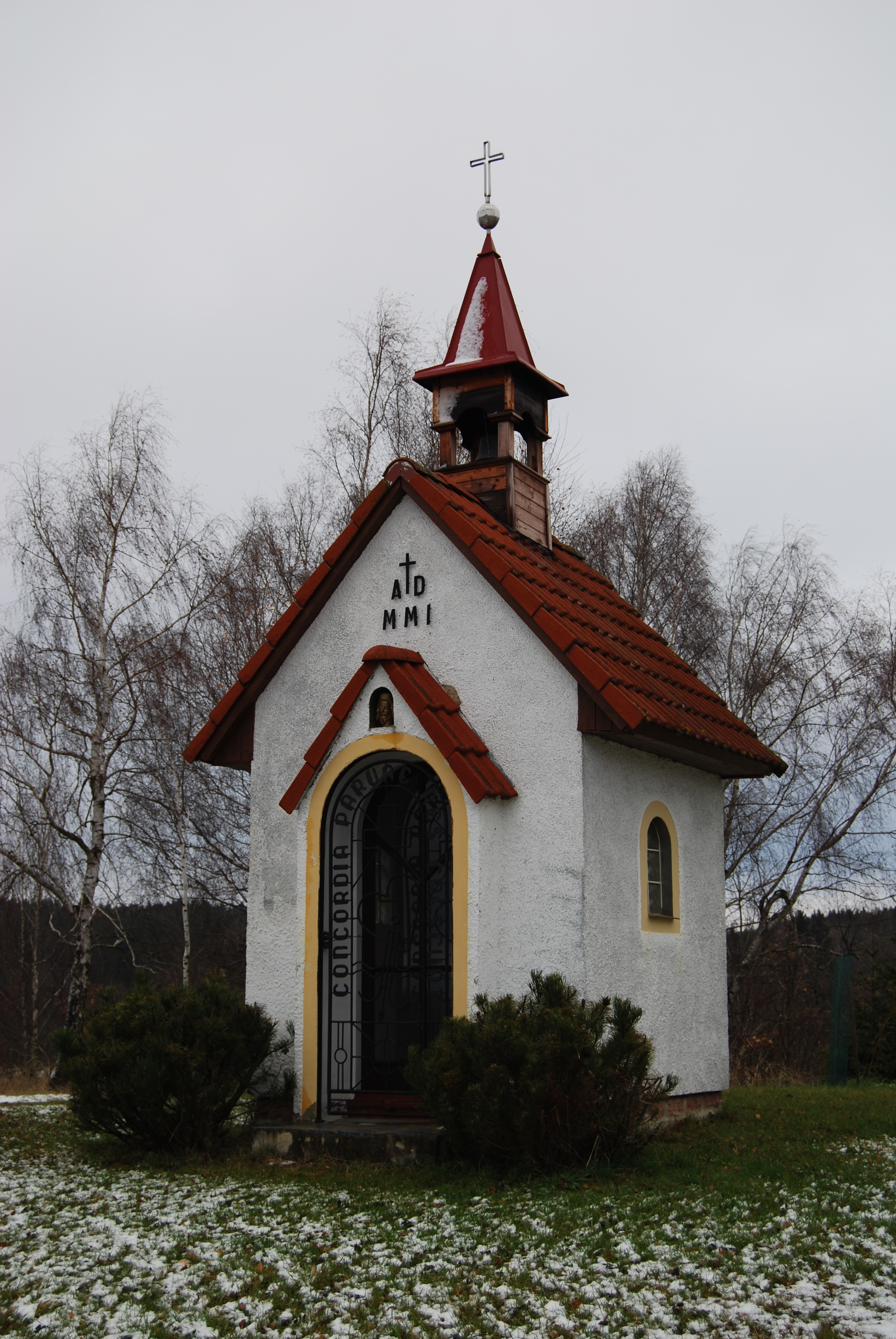 Pamětní kaple z roku 2001 na vrcholu návrší poblíž komunikace II/174 Březnice - Milín. Obec Lazsko v okrese Příbram, kraj Středočeský. Česká republika.